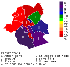 Indicatie van het percentage Nederlandstaligen in het Brussels Hoofdstedelijk Gewest op basis van de verkiezingsuitslag van de federale verkiezingen van 10 juni 2007. Op de kaart wordt het aantal stemmen op Nederlandstalige partijen weergeven als percentage van het totale aantal stemmen op basis van de officiële verkiezingsuitslag per kieskanton. De in de percentages opgenomen Nederlandstalige partijen zijn CD&V NVA, VLAAMS BELANG, Open Vld, GROEN!, Spa-Spirit en Lijst Dedecker.